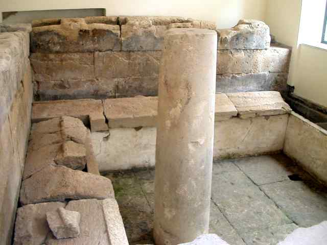 Desciption: Necropoli - Via Crispi (Taranto) Photographer: --Asia Date: 16.9.2004